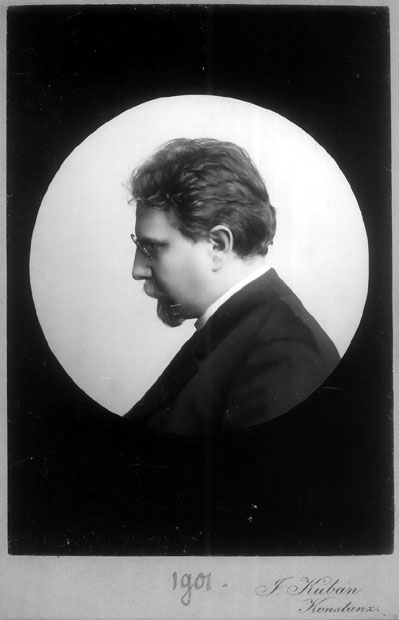 Otto-Erich-Hartleben-Porträt von ihm selbst datiert 1901